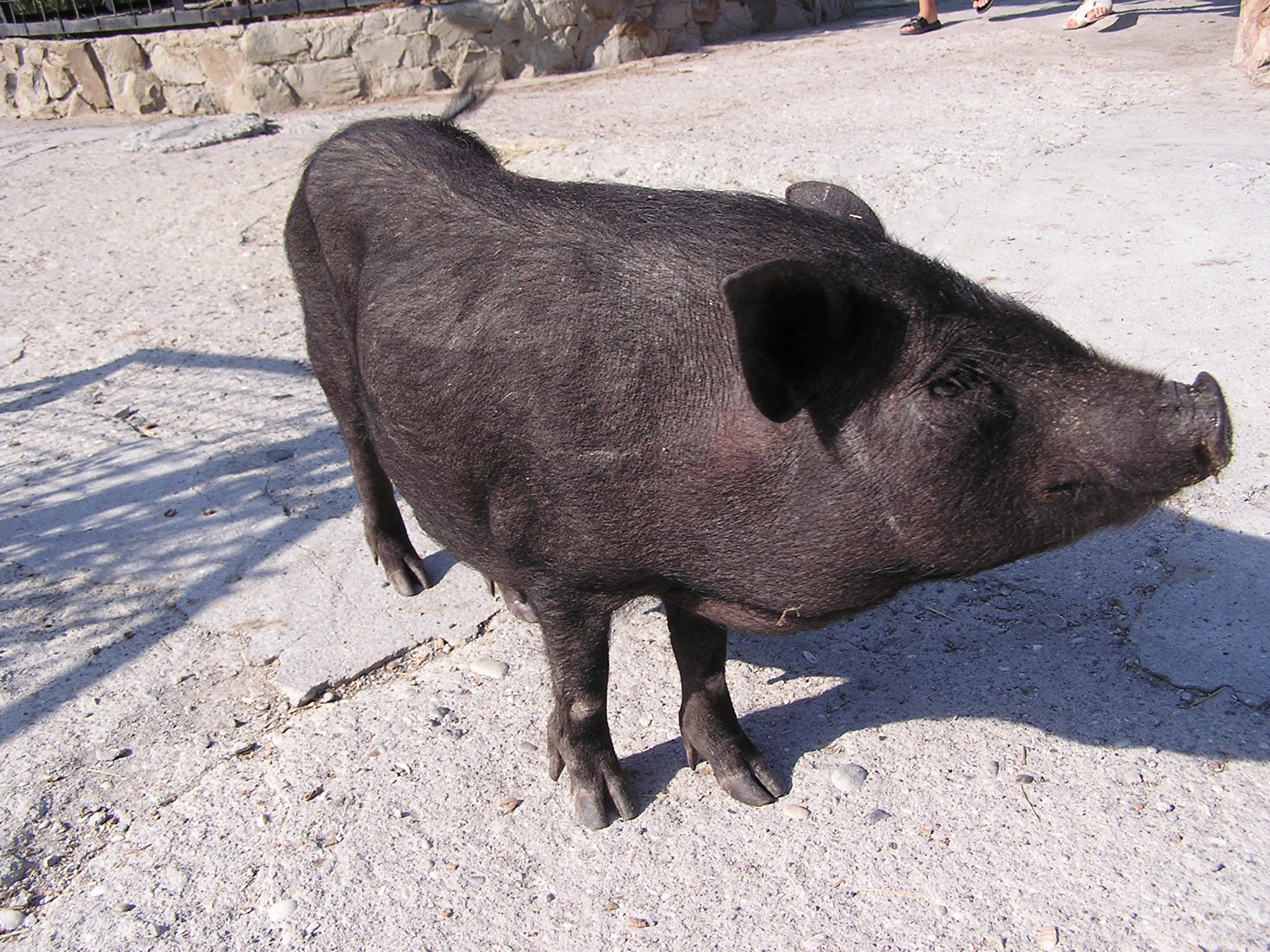 Ялтинский зоопарк. Вьетнамская свинья